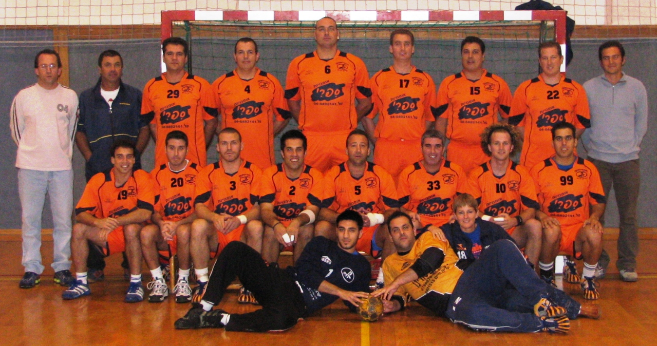 הקרייתים בעונת 2005/6